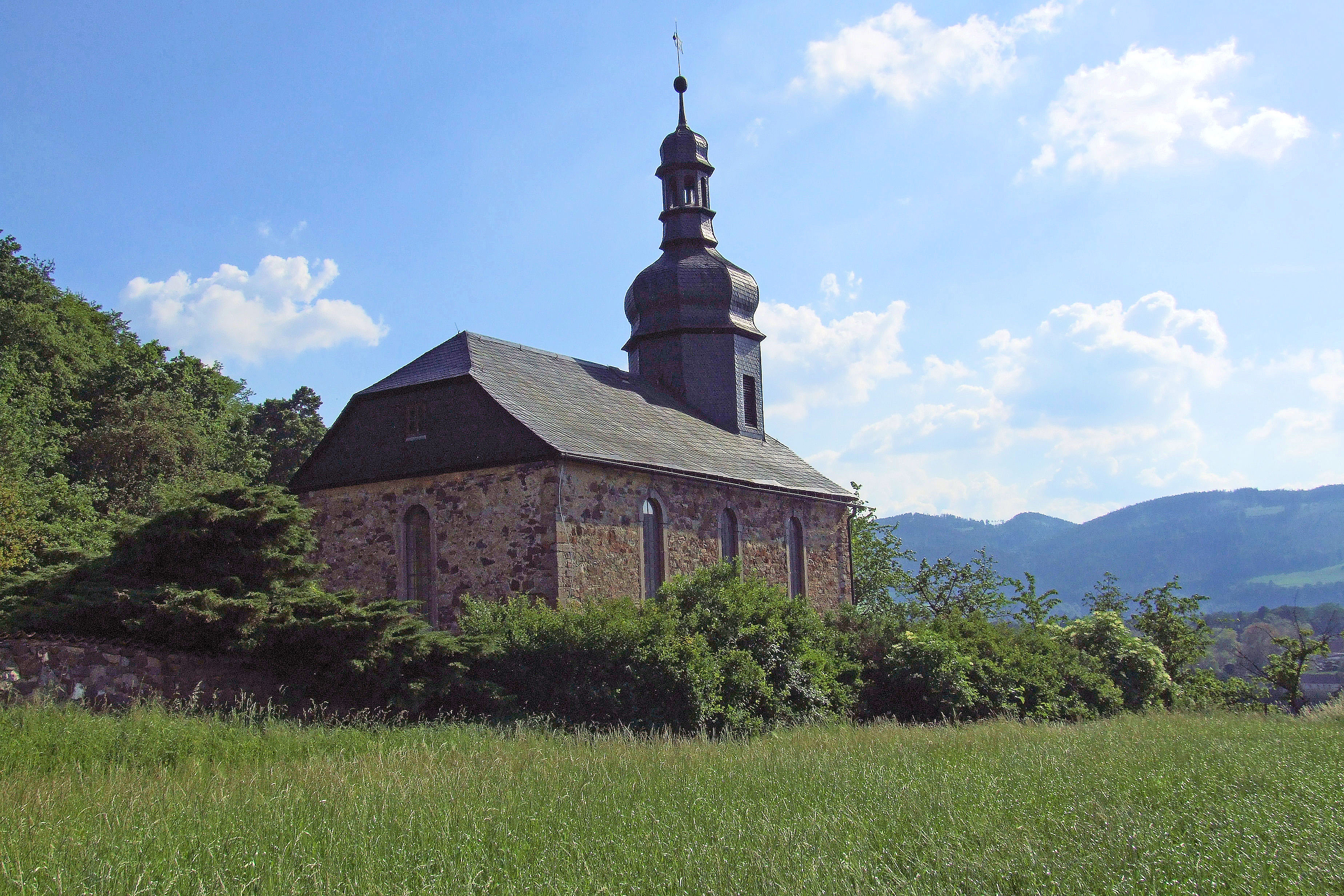 Kirche Bretternitz-Fischersdorf